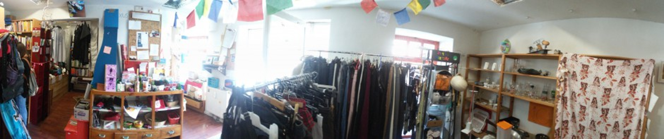 kostnix innsbruck